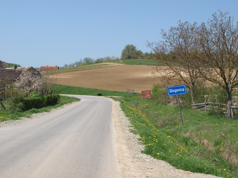 Ulaz u selo Glogovica, Brodsko-posavska županija.